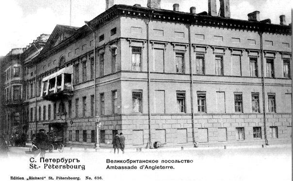 Старая дореволюционная открытка со зданием британского посольства в Санкт-Петербурге.